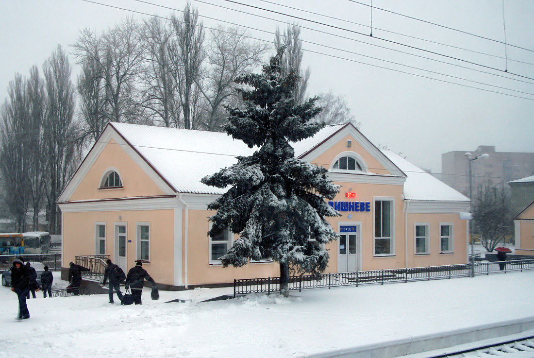 Вокзал станції Вишневе. Грудень 2008.